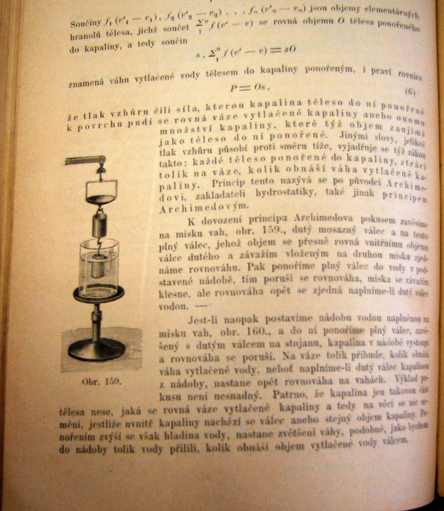 ukázka ze Zengerovy knihy